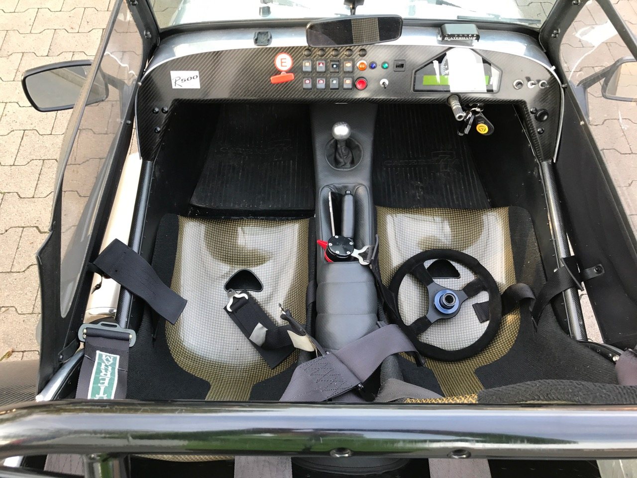 Innenaufnahme Cockpit / Carbonsitzschalen